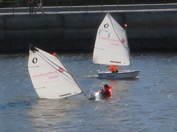 Segelkurs mit Optimisten, ein Boot ist gekentert